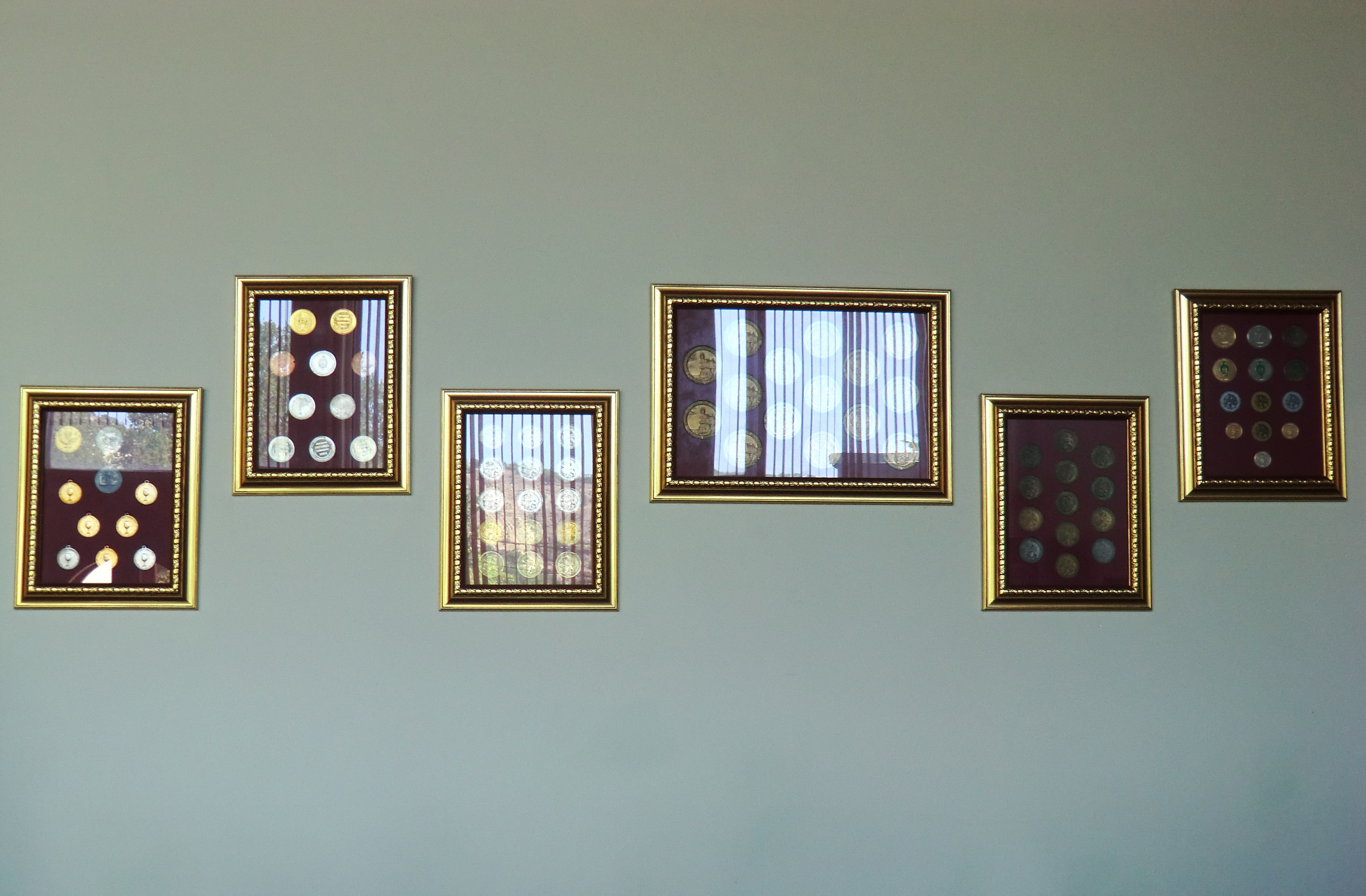 Награды полученые винами Инкерманского завода марочных вин